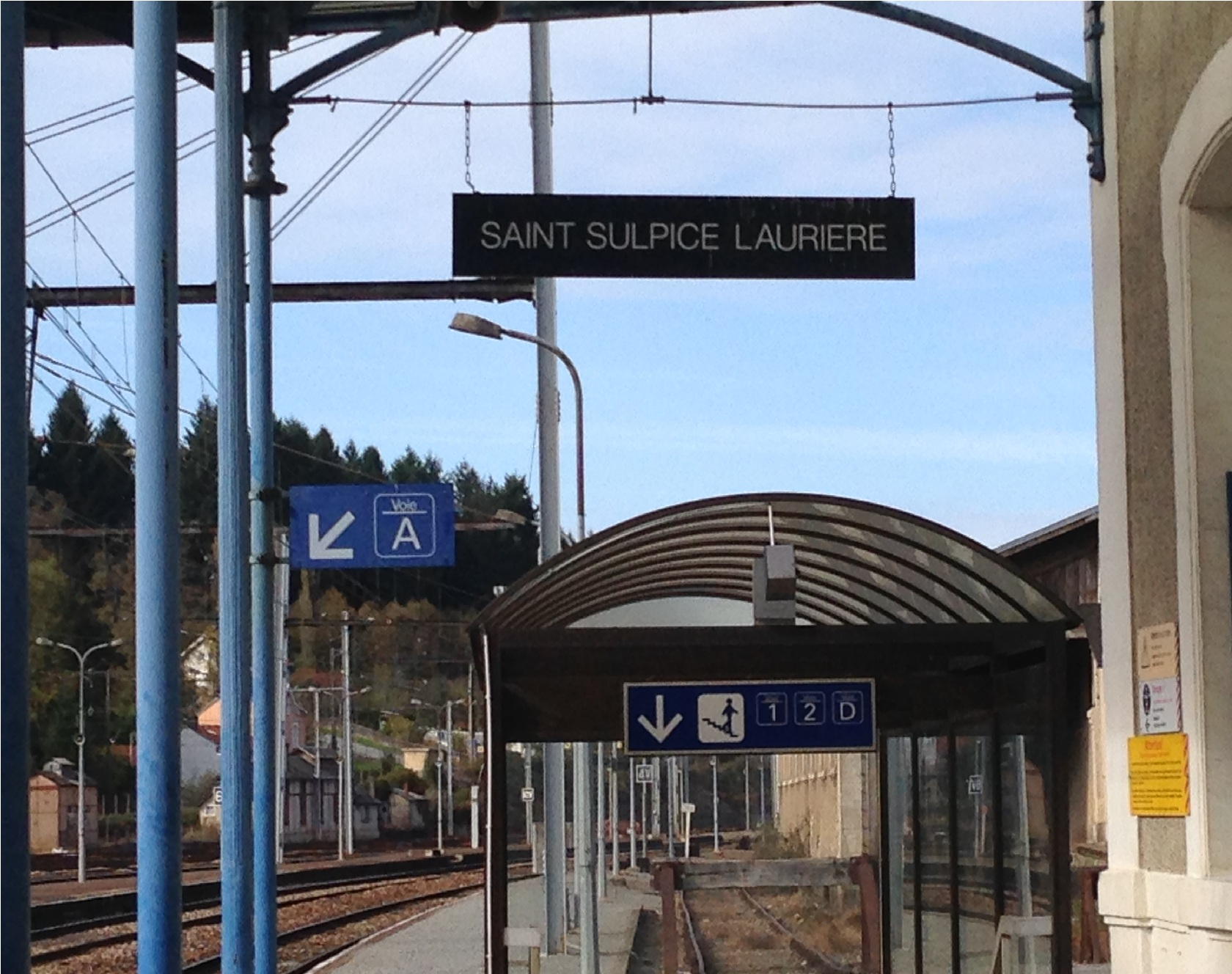 Gare de St Sulpice Lauriere-2014